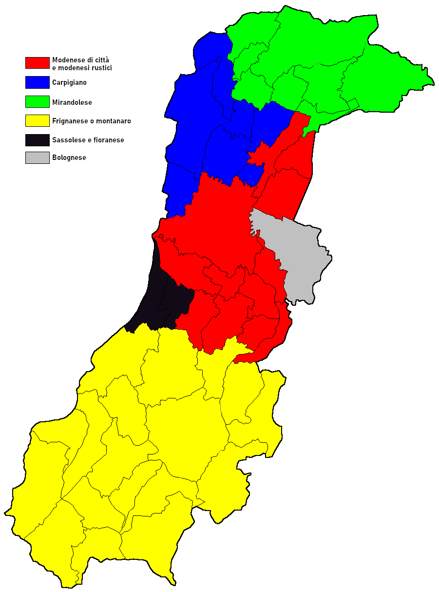 Legenda: verde: sotto-dialetto mirandolese blu: sotto-dialetto carpigiano rosso: modenese di città giallo: sotto-dialetto frignanese grigio: bolognese